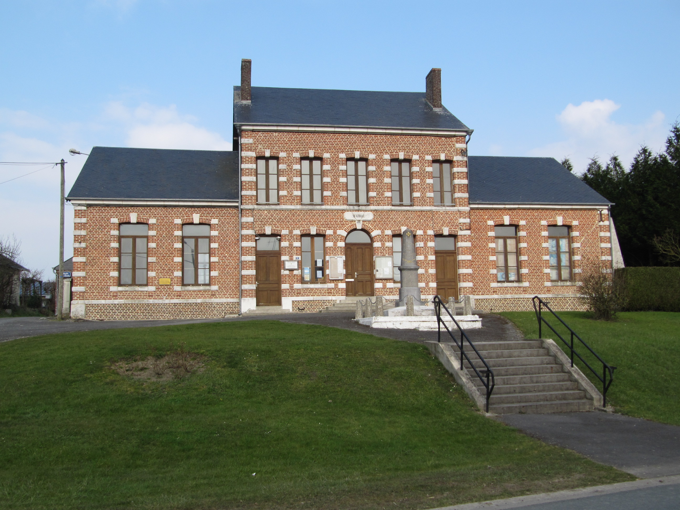 Saint-Jean-aux-Bois (Ardennes)